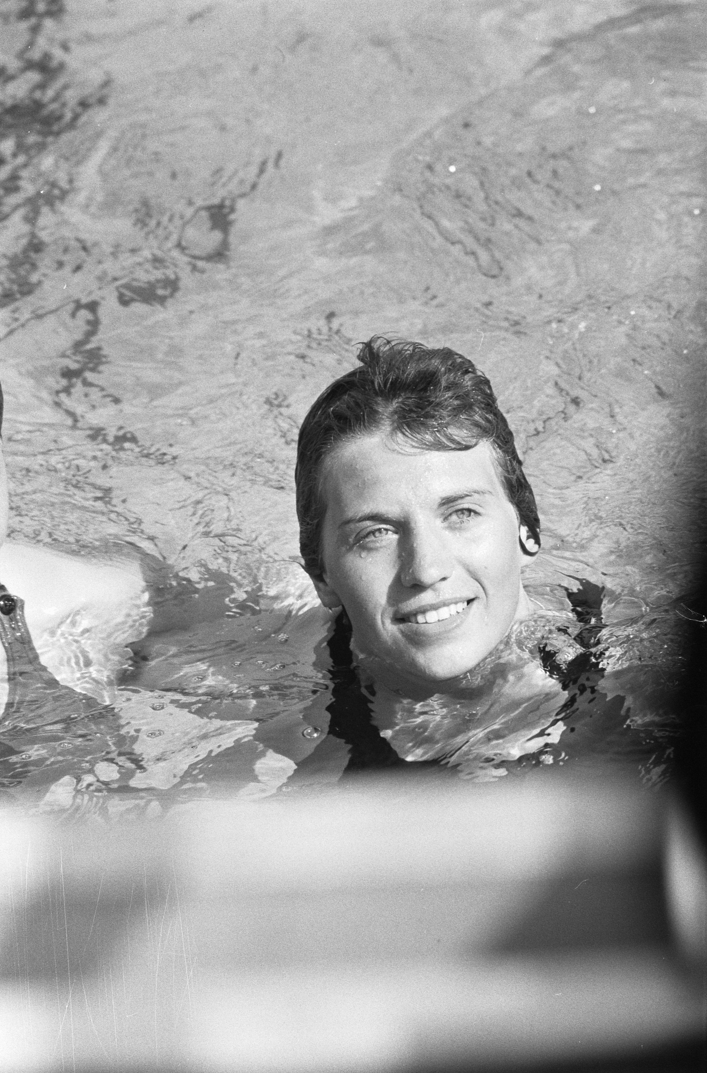 Collectie / Archief : Fotocollectie Anefo Reportage / Serie : [ onbekend ] Beschrijving : Tweede selectiewedstrijden voor Olympische Spelen in Haarlem, Ria van Velsen Datum : 24 juli 1960 Locatie : Haarlem Trefwoorden : portretten, sport, zwemmen Persoonsnaam : Velsen, Ria van Fotograaf : Pot, Harry / Anefo Auteursrechthebbende : Nationaal Archief Materiaalsoort : Negatief (zwart/wit) Nummer archiefinventaris : bekijk toegang 2.24.01.05 Bestanddeelnummer : 911-4484